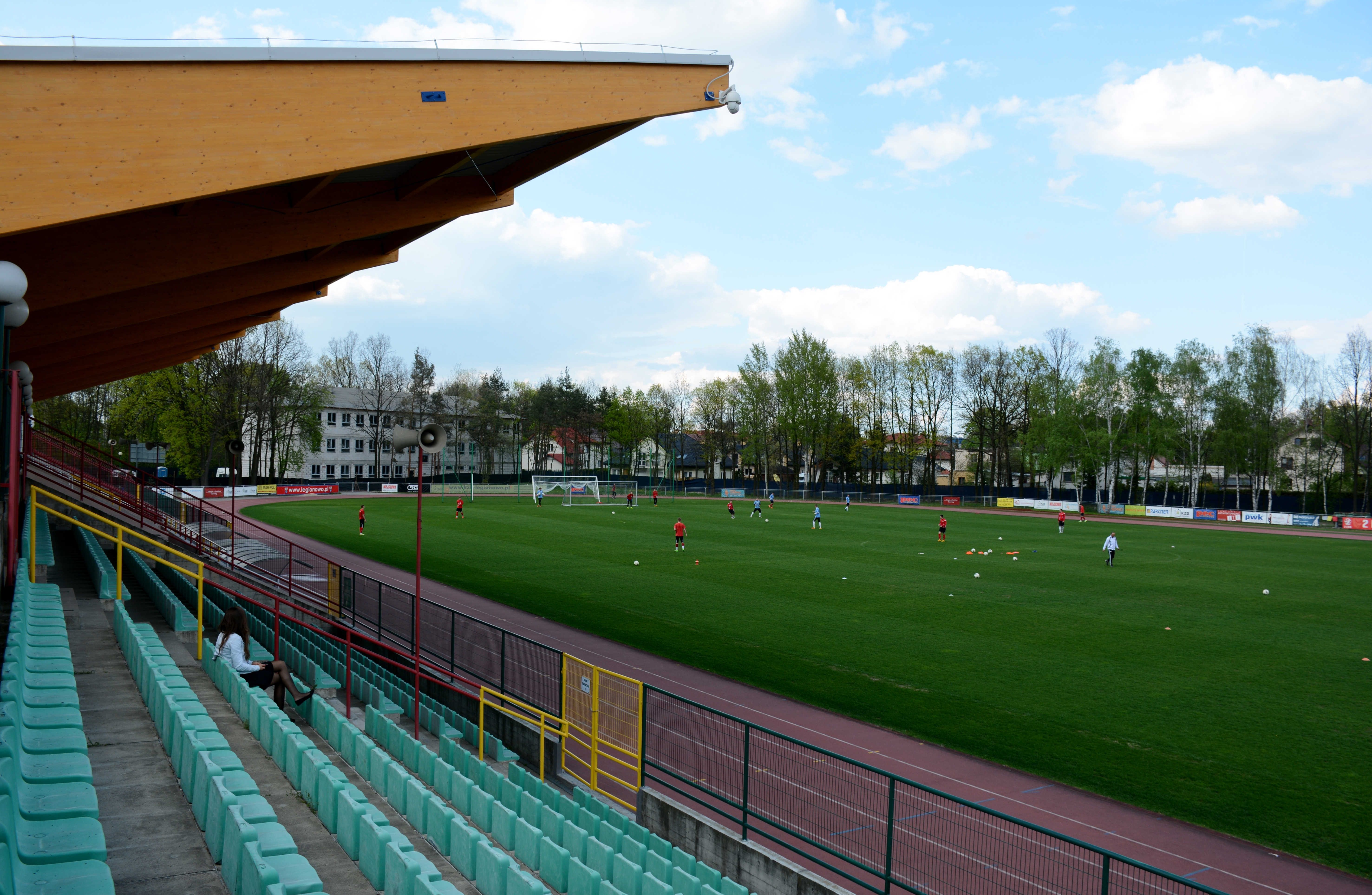 Legionowo,Polska,UE.